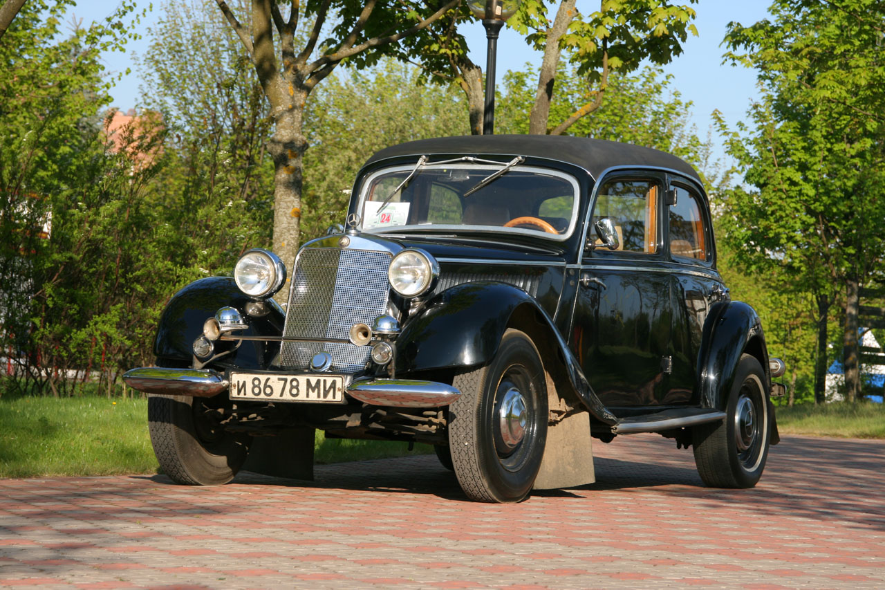 Mercedes-Benz на слете Ретро-Минск 2009